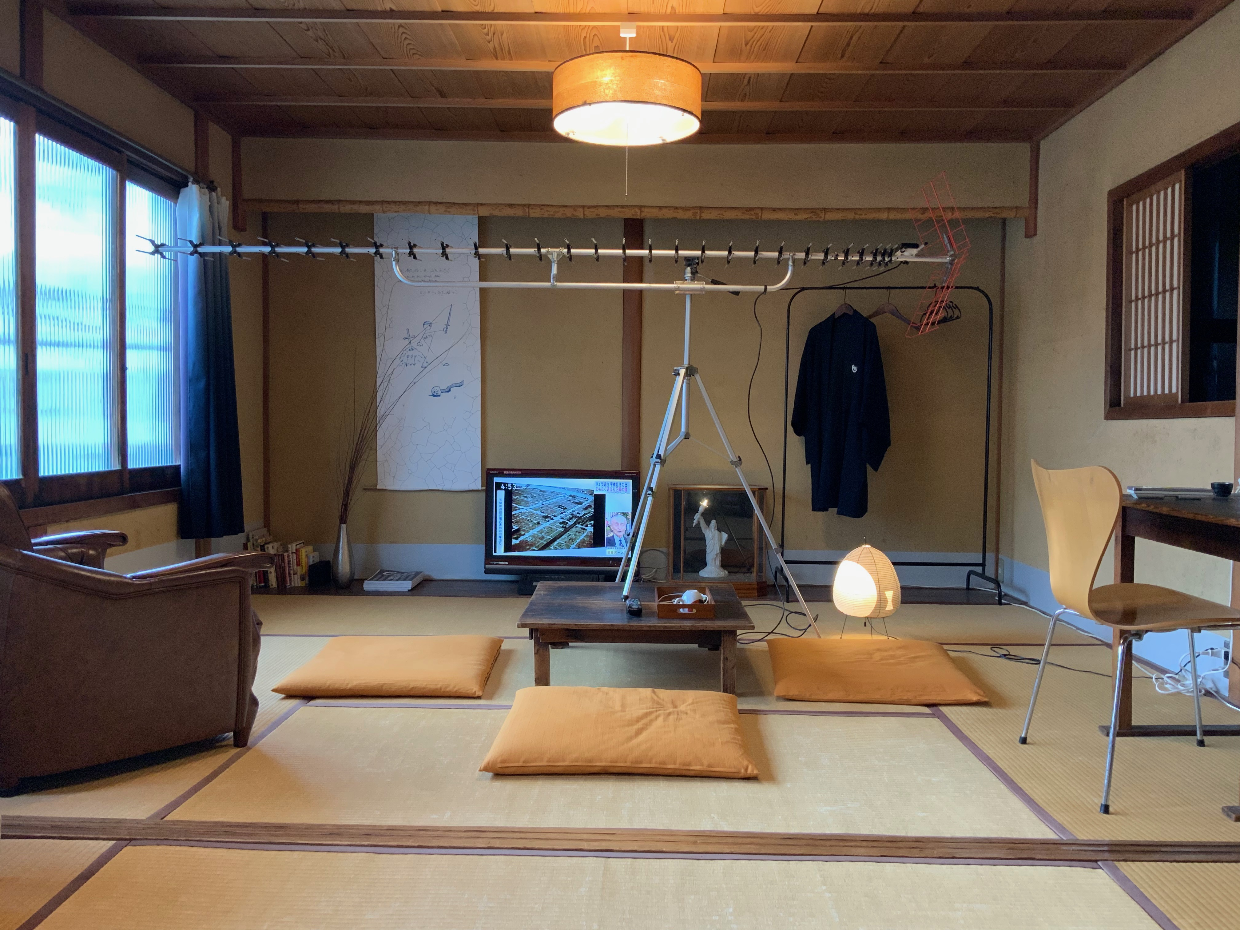 2階東側の客間